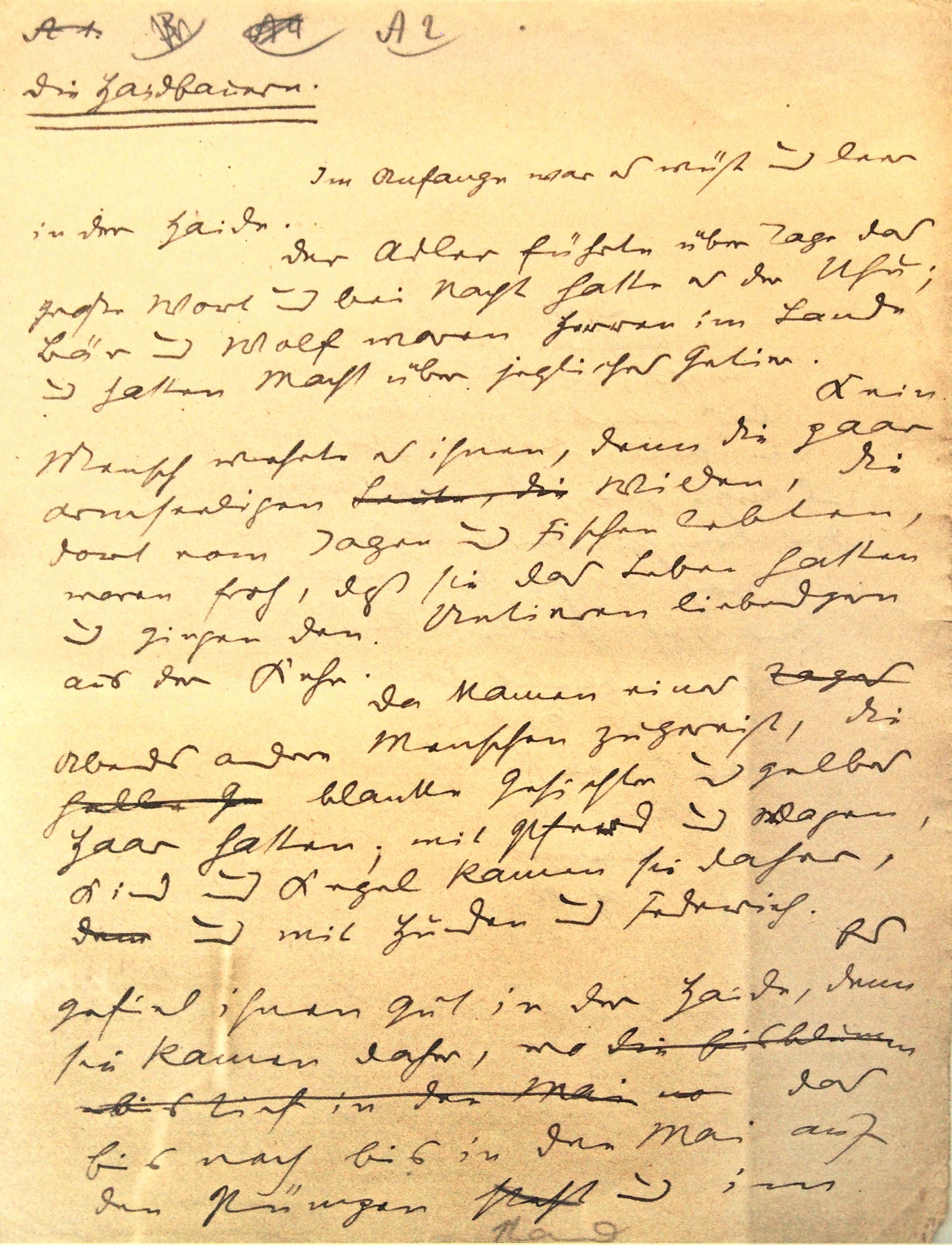 Faksimile der Handschrift von Hermann Löns: 1. Kapitel "Die Haidbauern" aus "Der Wehrwolf" „Die Haidbauern. Im Anfange war es wüst und leer in der Haide. Der Adler führte über Tage das große Wort, und bei Nacht hatte es der Uhu; Bär und Wolf waren Herren im Lande und hatten Macht über jegliches Getier. ... “